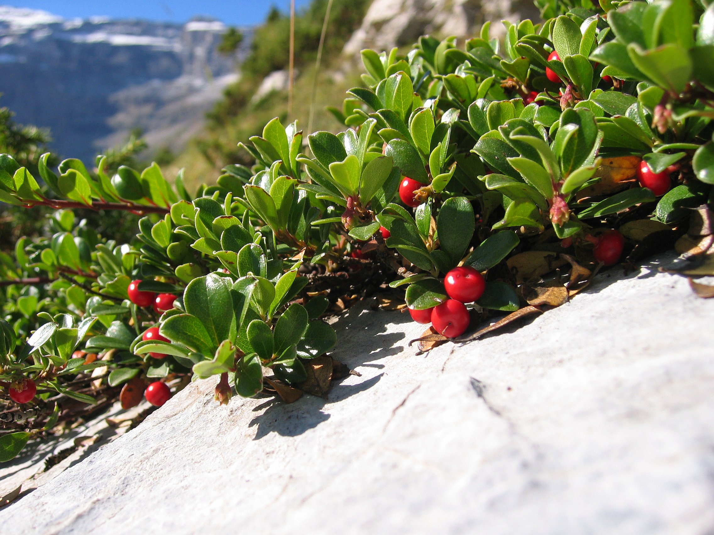 Arctostaphylos uva-ursi, near Gavarnie ~1700m, Pyrenees, France